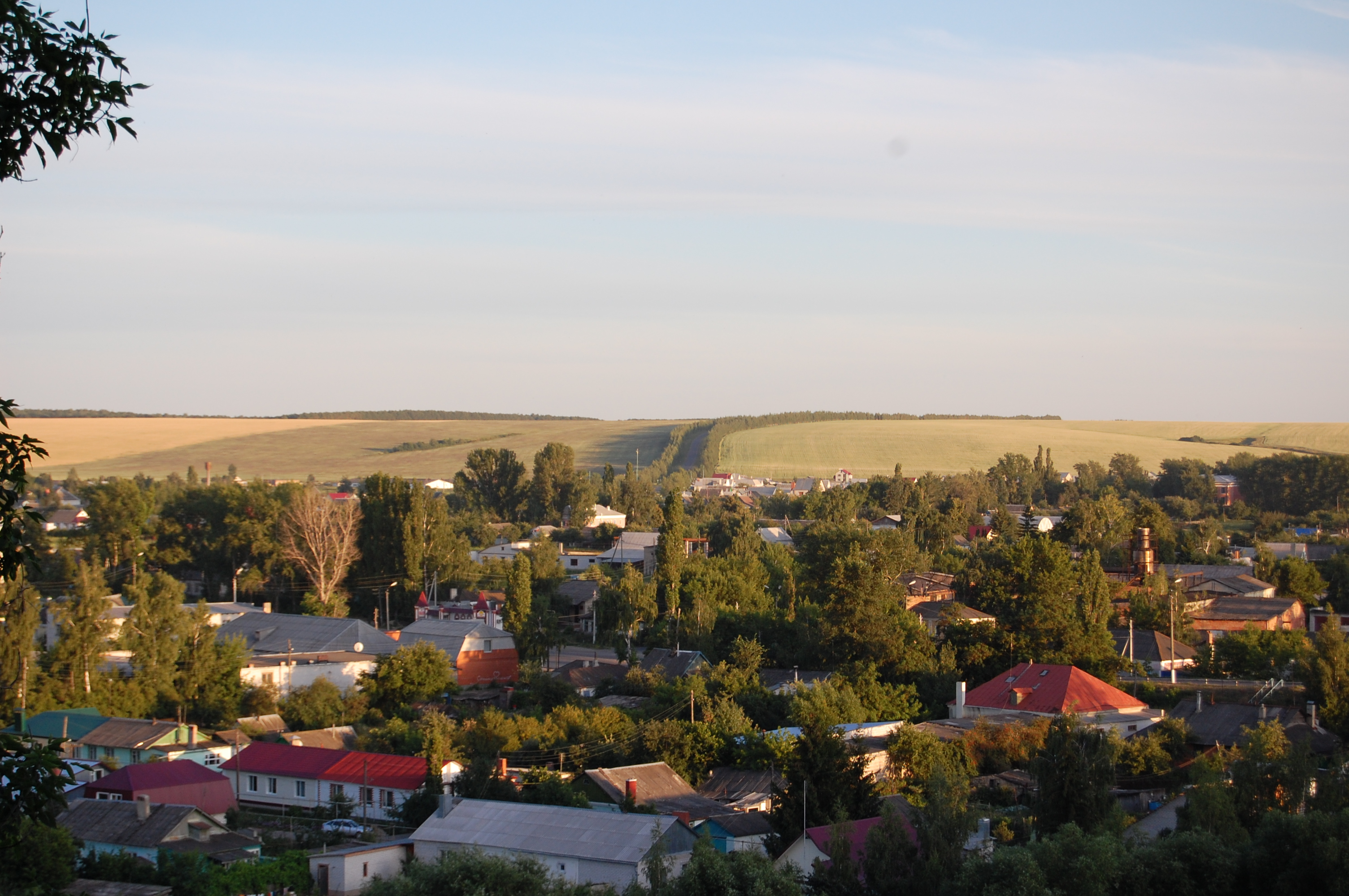 Ливны (Орловская обл.). Вид на "заречную" часть города